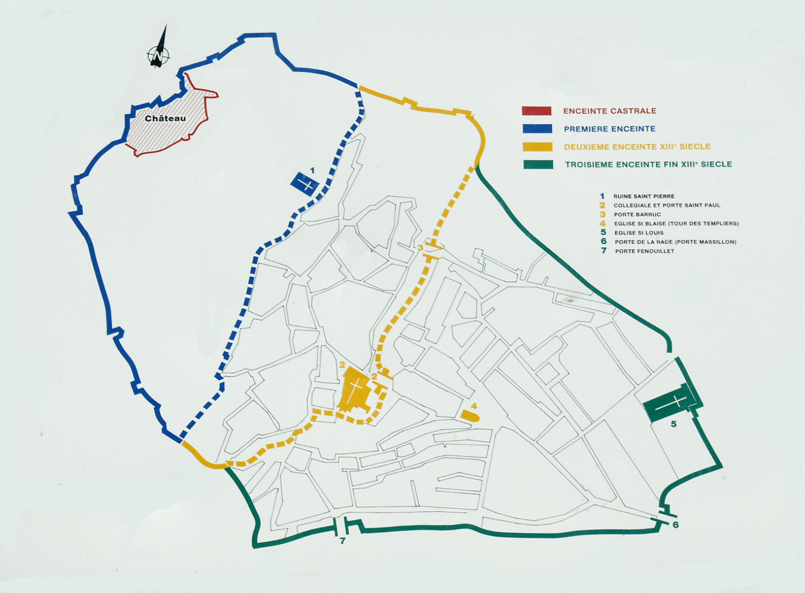 Plan de la ville médiévale d'Hyères. Le plan positionne les différentes enceintes urbaines ainsi que le château qui dominait la ville en position sommitale.